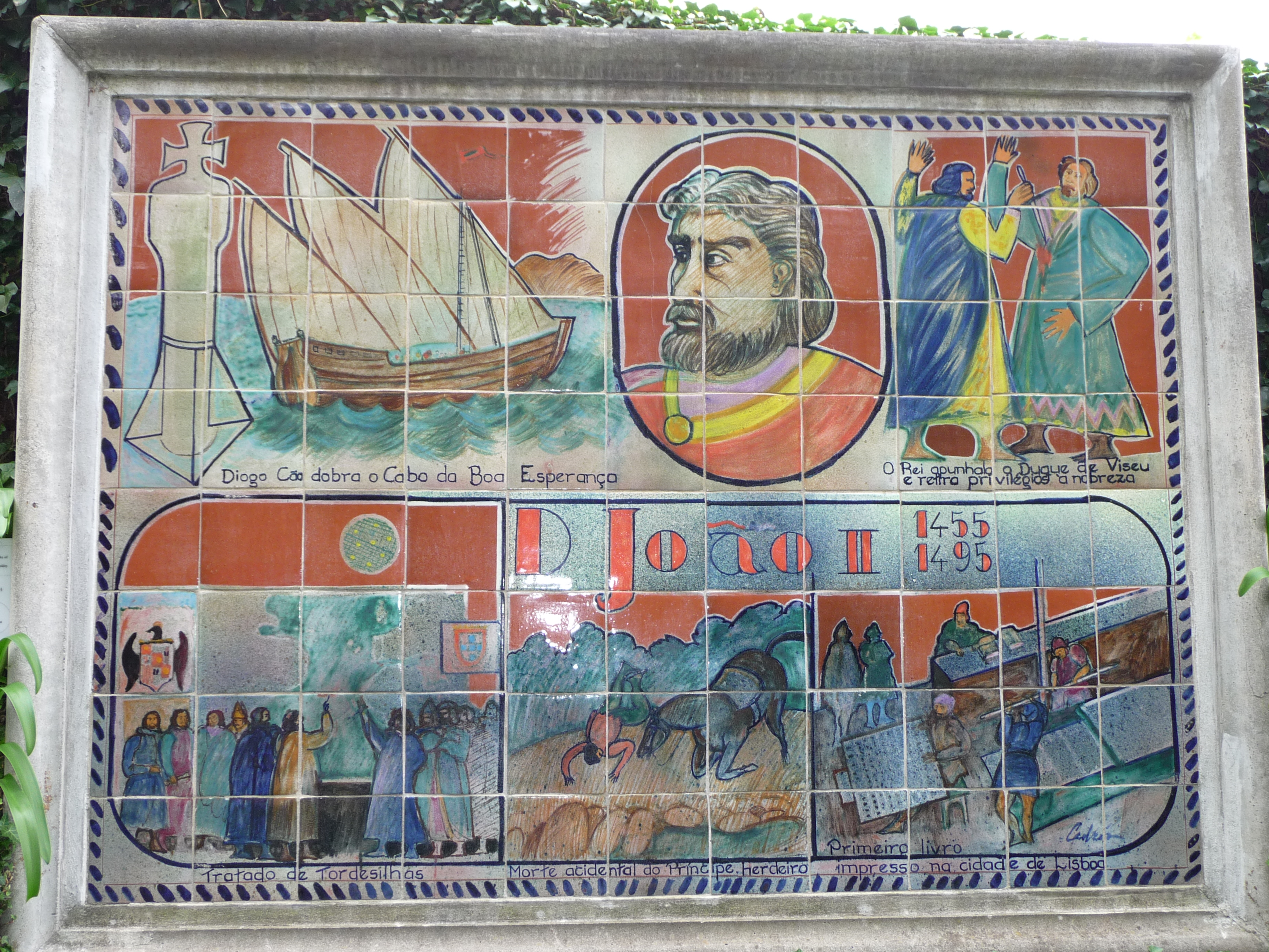 II. János portugál király uralkodásának fő eseményei (Madeira, Monte, Trópusi Kert) — azulejo: 1. Diogo Cão megkerüli a Jóreménység fokát (mai ismereteink szerint ez tévedés; Cão nem jutott el odáig); 2. a király leszúrja a viseui herceget, és visszavonja a nemességnek adott előjogokat; 3. a tordesillasi szerződés;4. balesetben meghal fia, a trónörökös 5. az első, Lisszabonban nyomtatott könyv.